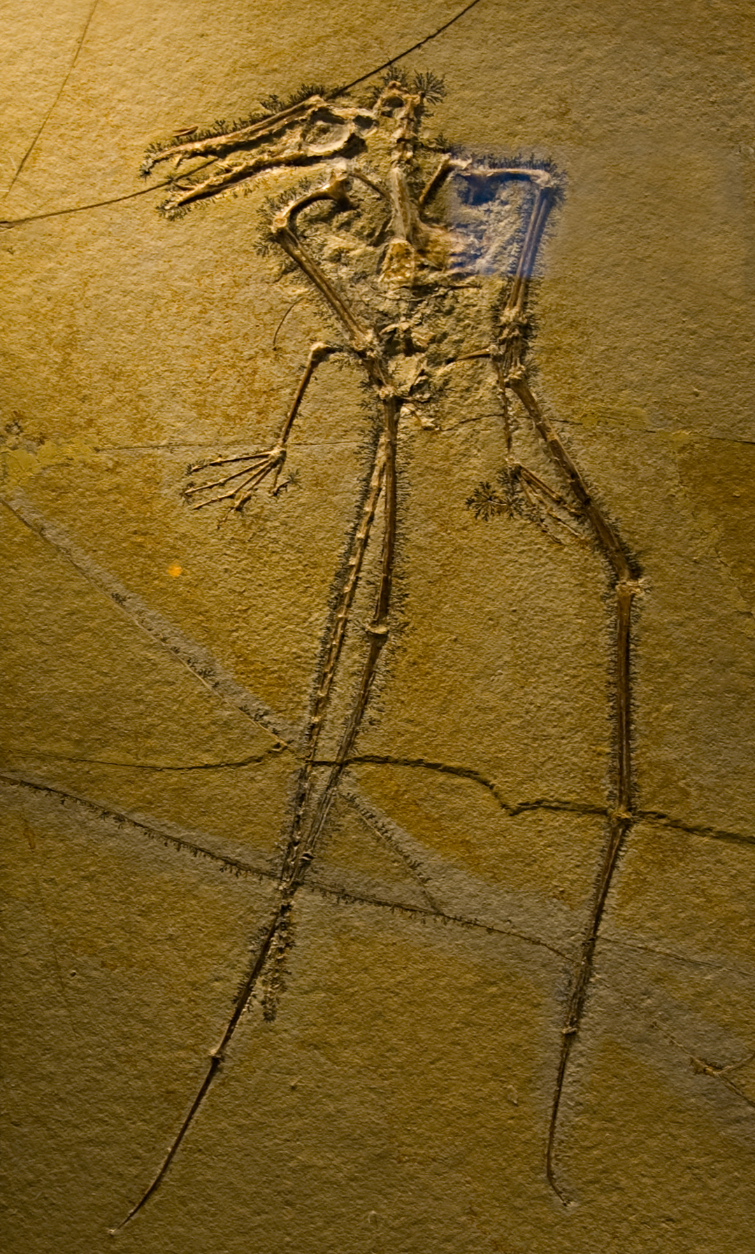 Jura Museum - Eichstätt Rhamphorhynchus muensteri (Original) Untertithanium (Oberjura), rund 150 Mio. Jahre alt gefunden in Eichstätt Langschwanz-Flugsaurier mit deutlich sichtbarem Brustbeinkiel. Das große Brustbein diente den Flugsauriern, genau wie den Vögeln, als Ansatz ihrer für den aktiven Flug notwendigen starken Brustmuskulatur. Long-tailed pterosaur with clearly visible breast-bone keel. In pterosaurs, just like in birds, the large breast-bones funktions as support for the strong breast muscles necessary for flapping flight. (Jura Museum - Eichstätt)